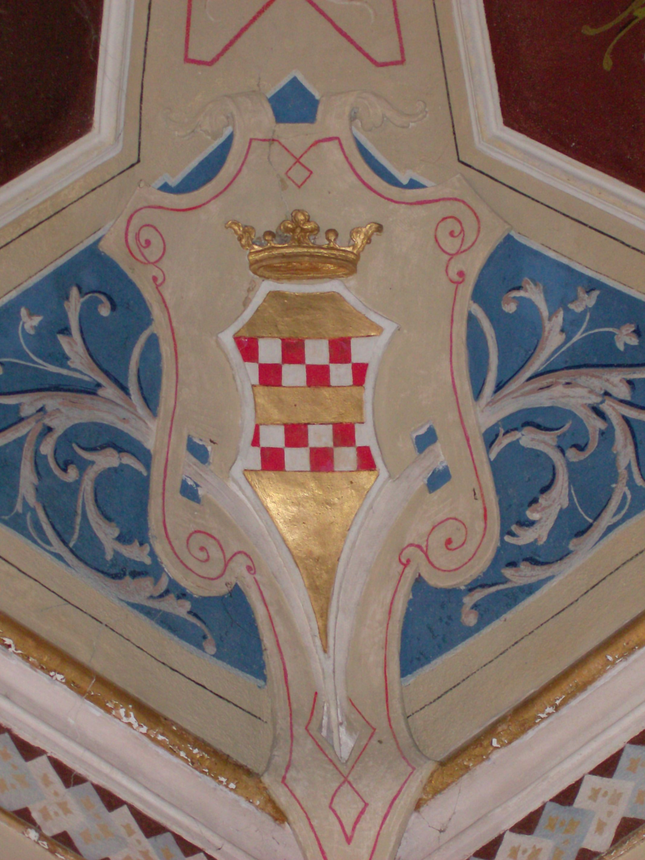 Stemma della famiglia Serra a Rapallo (Genova) in Villa Tigullio. Blasonatura: d'oro a due fasce scaccate di rosso e d'argento di due file (Andrea Borella "Annuario della Nobiltà Italiana" Edizione XXXI Teglio (SO) 2010 S.A.G.I. Casa Editrice vol. 2 pag. 1938)